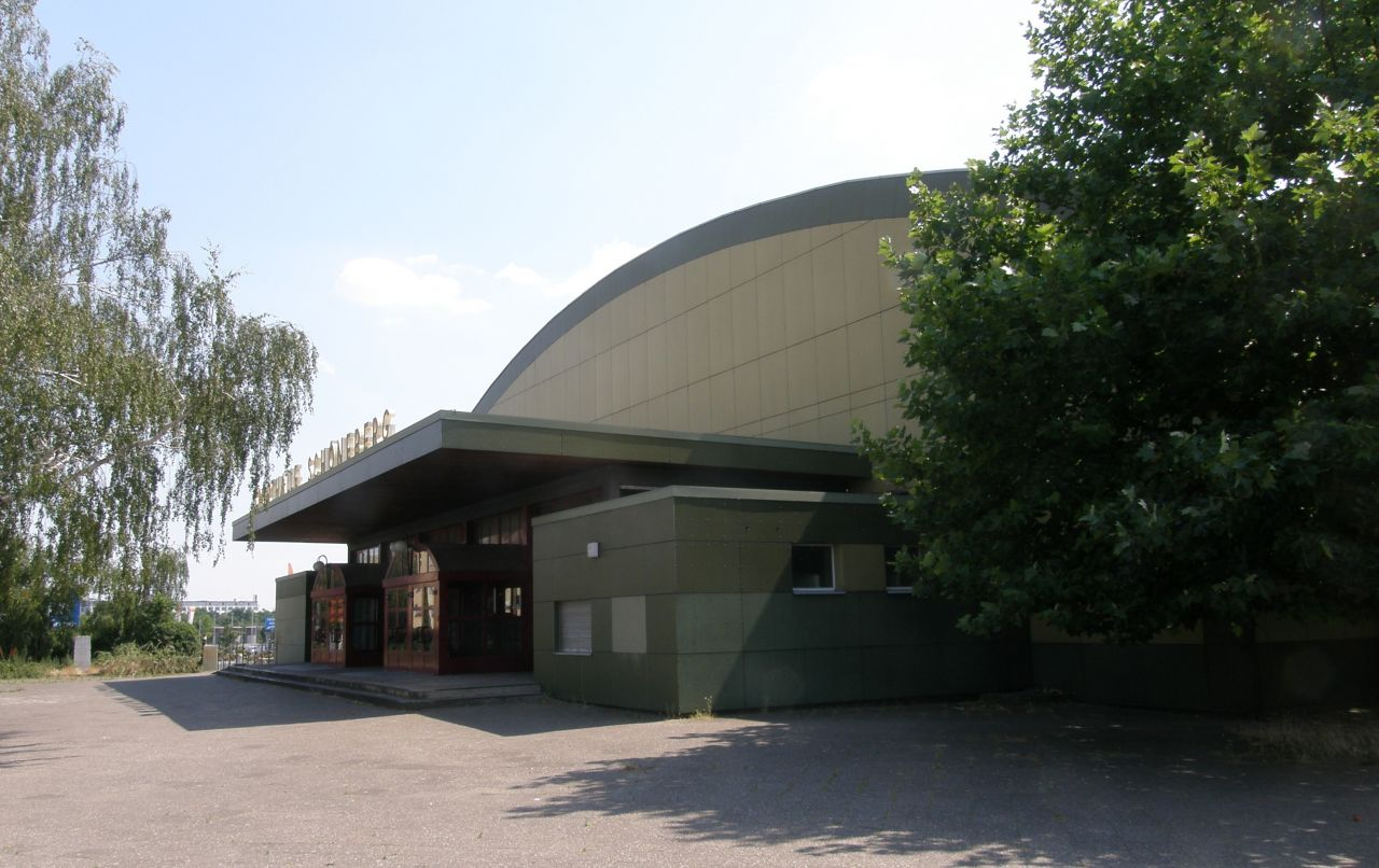 Sporthalle Schöneberg im Willibald-Gebhardt-Sportzentrum-Schöneberg, Sachsendamm 12, Berlin-Schöneberg